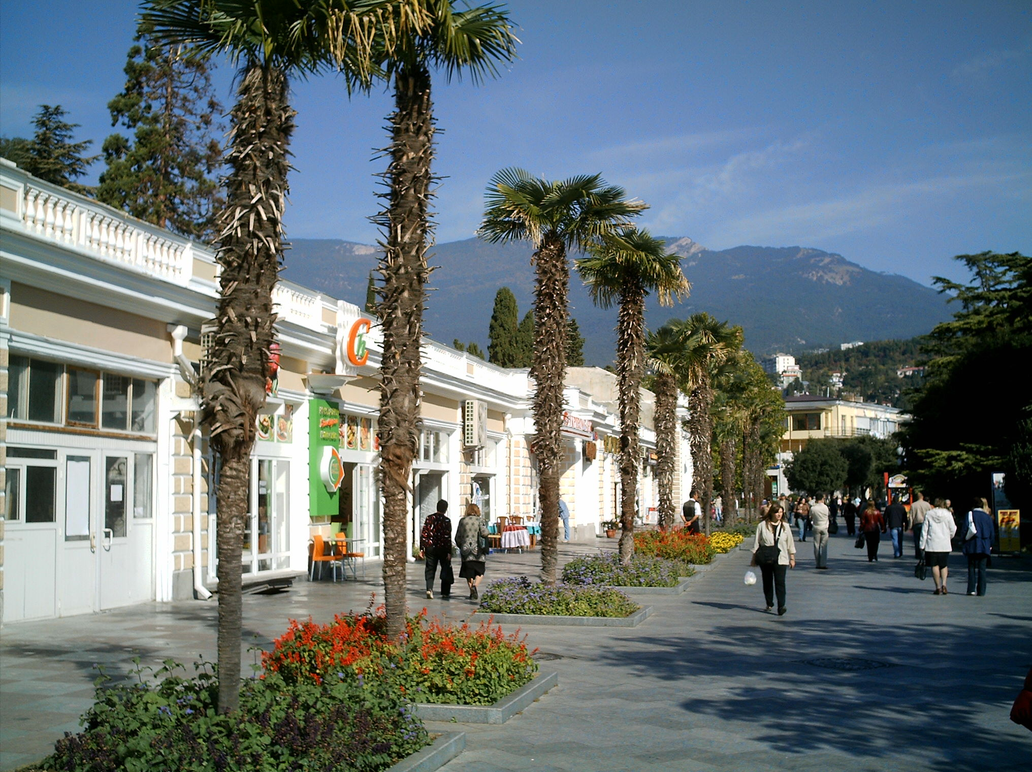 Набережная в Ялте